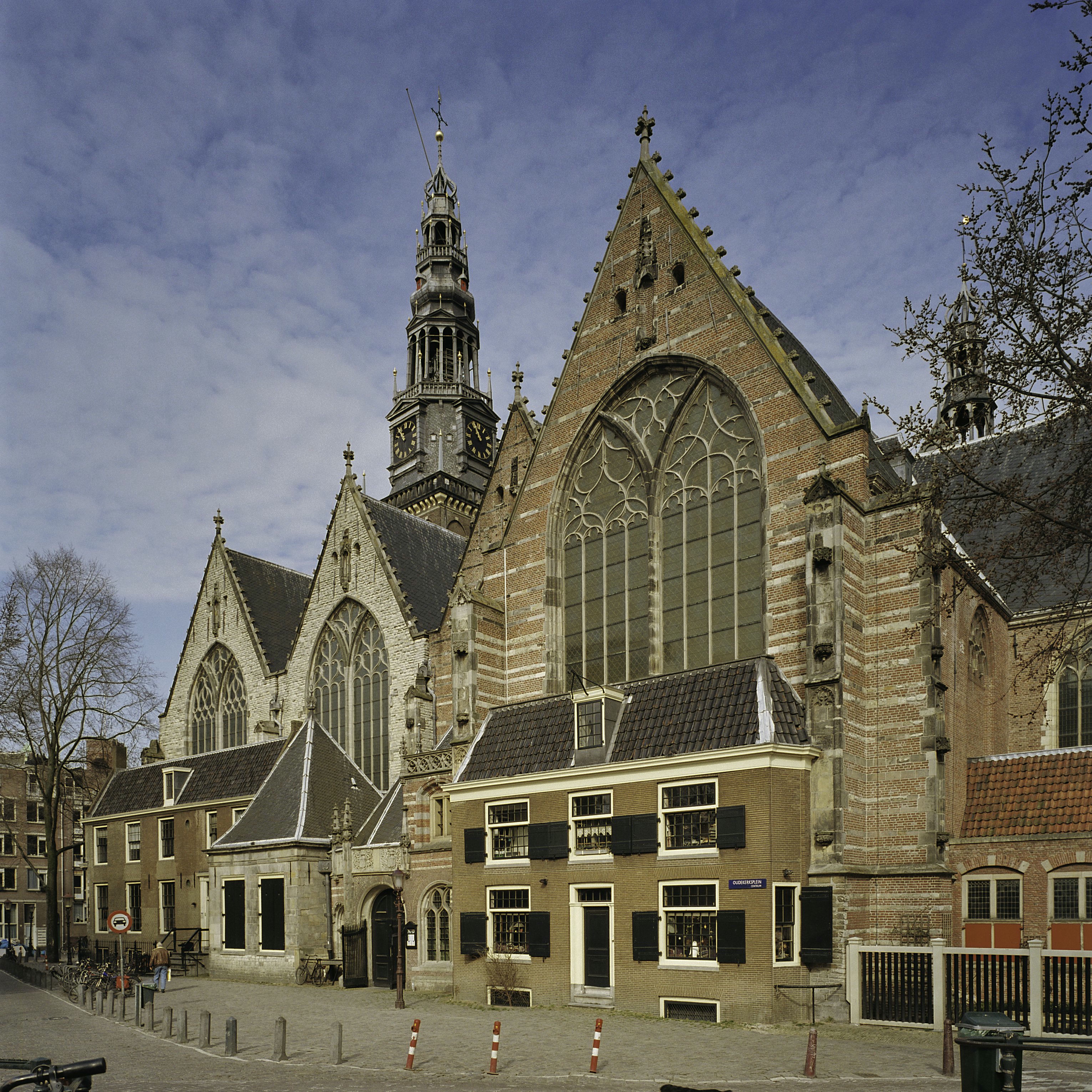 Oude kerk: Overzicht dwarskapel met topgevel (opmerking: Gefotografeerd voor Monumenten In Nederland Noord-Holland)